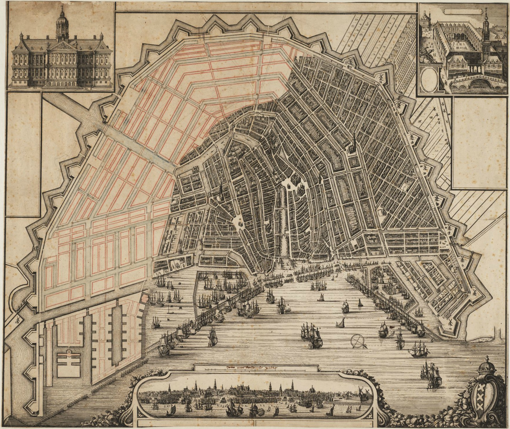 Proefdruk van een plattegrond van Amsterdam waarop de derde uitleg ingevuld werd en het uitbreidingsplan van Daniel Stalpaert ingetekend staat. Deze invulling werd pas na de voltooiing van de omwalling bepaald. Van alle voorlopige ontwerpen is dit het enige blad dat de hele stad laat zien. Uiteindelijk is besloten de grachten een extra bocht te geven. Ook de uitvalswegen hebben een andere plaats gekregen. Schaal 1:7.250. Waarschijnlijk door Nicolaes Visscher of Joan Blaeu in opdracht van het stadsbestuur vervaardigd. Oriëntatie: zuidzuidwest boven.